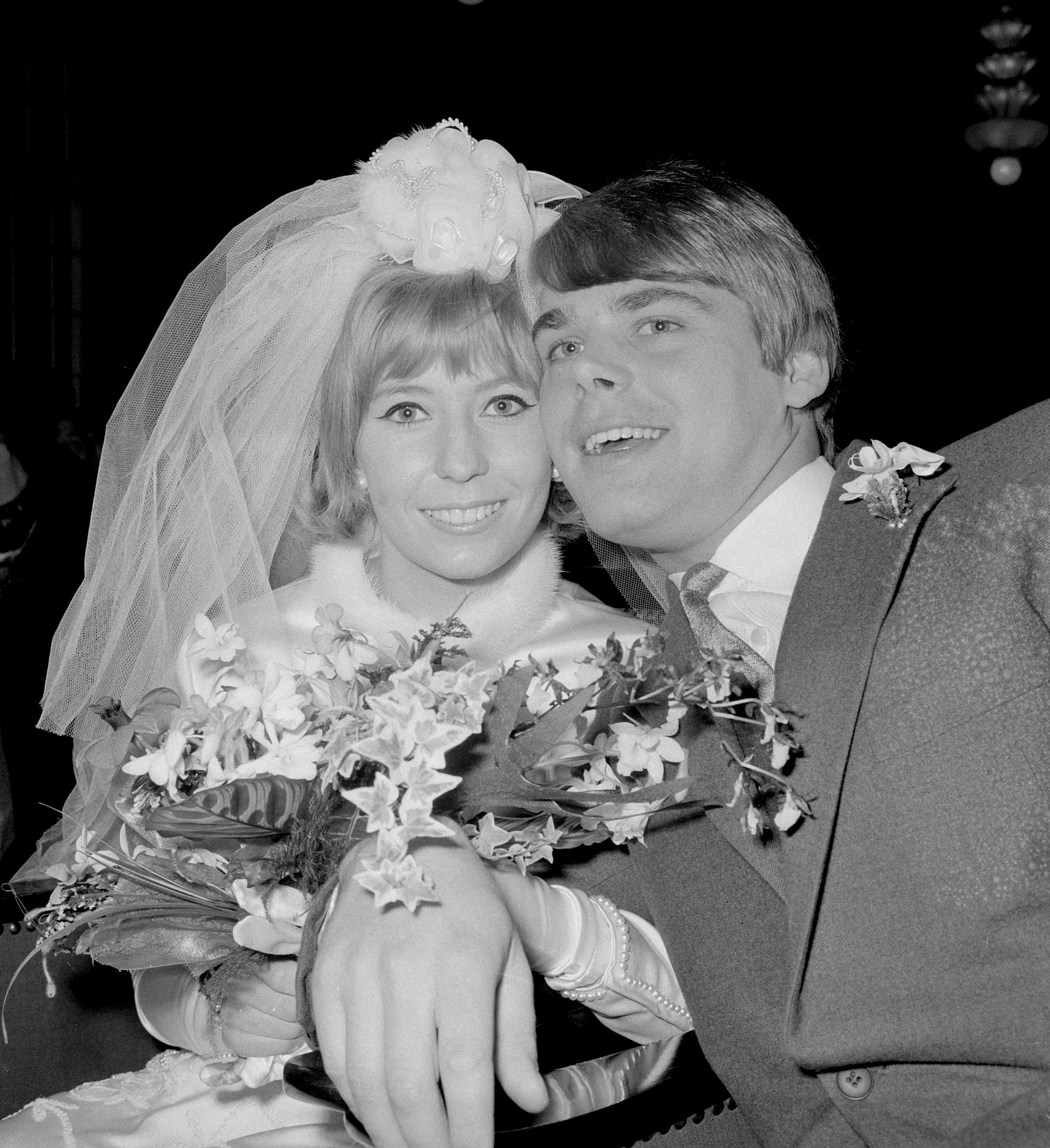 Huwelijk Willeke Alberti en Joop Oonk te Amsterdam in Pius X kerk te Amsterdam